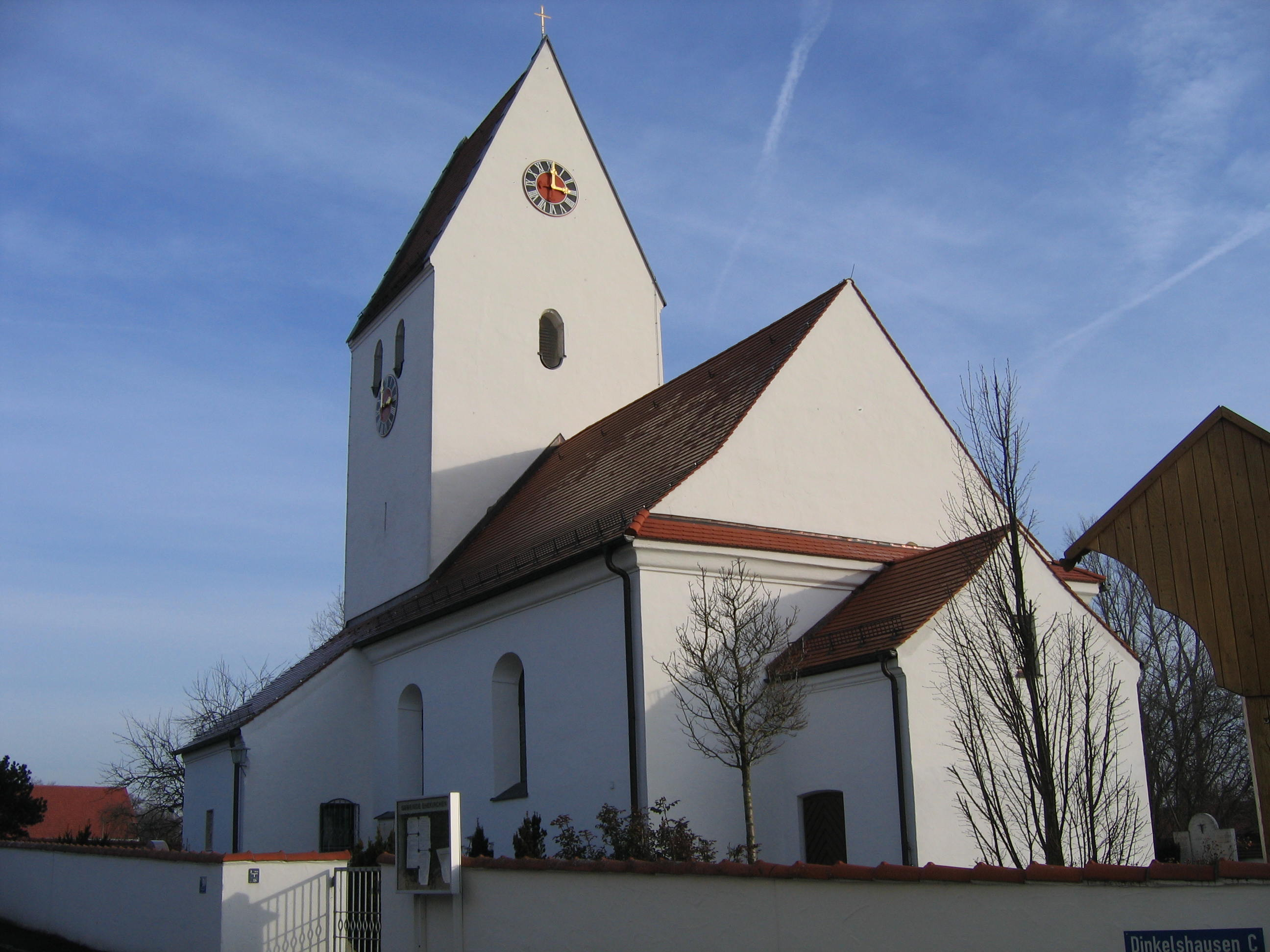 Die Pfarrkirche St. Gertrud in Ehekirchen-Dinkelshausen.